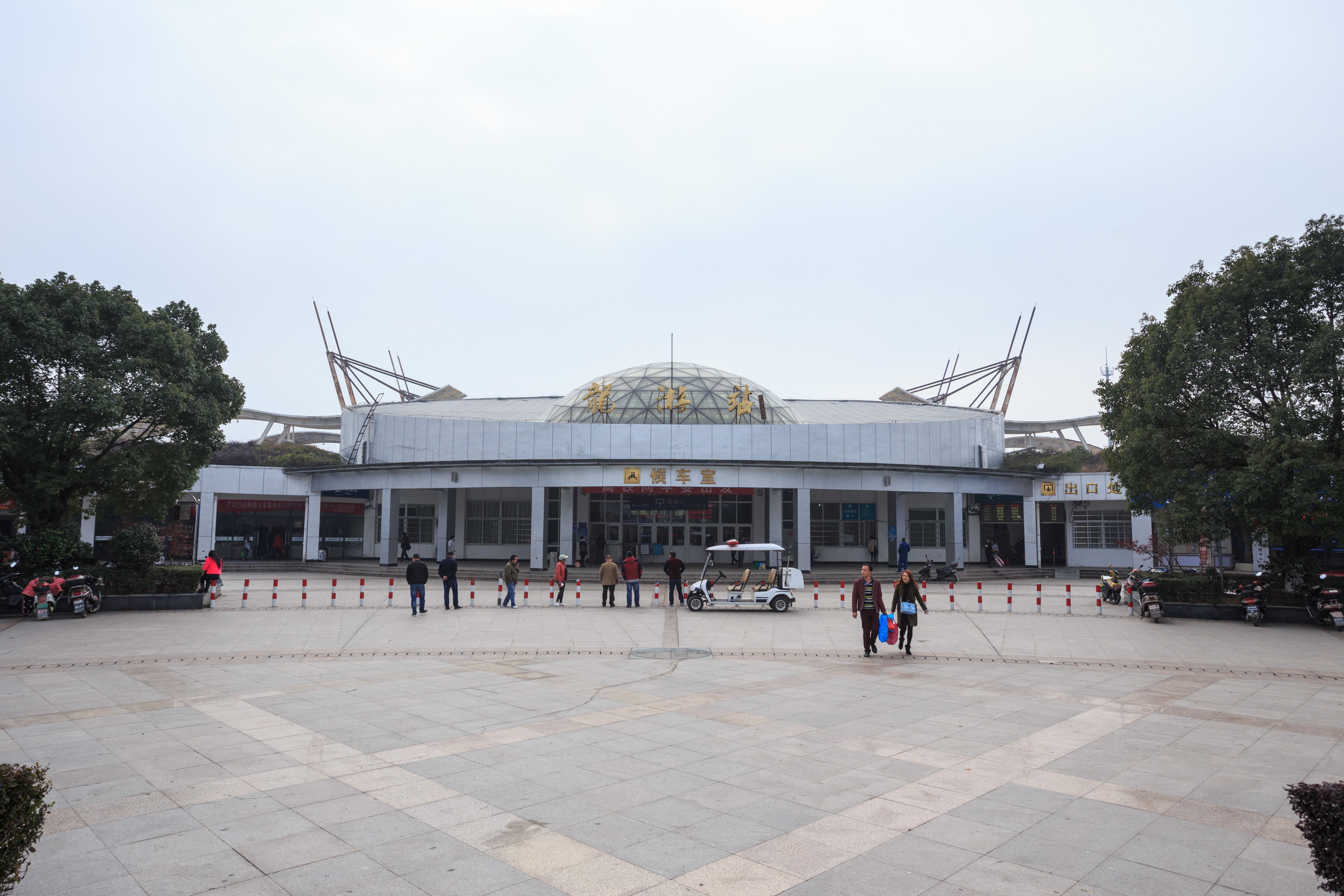 龙游站